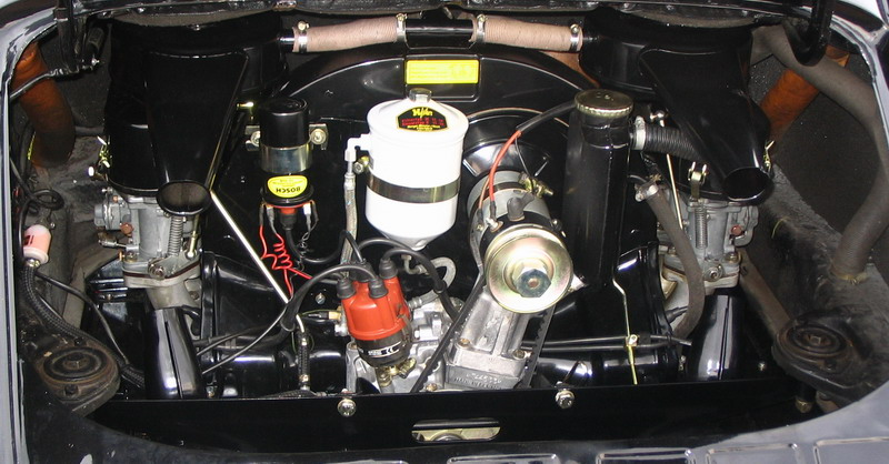 Motor Porsche 912. De motor is afkomstig van de Porsche 356 C. Uiterlijk zijn alleen de luchtfilters afwijkend van de motor van de 356 C. (Eigen foto, niet beschermd door auteursrecht, vrij te gebruiken)